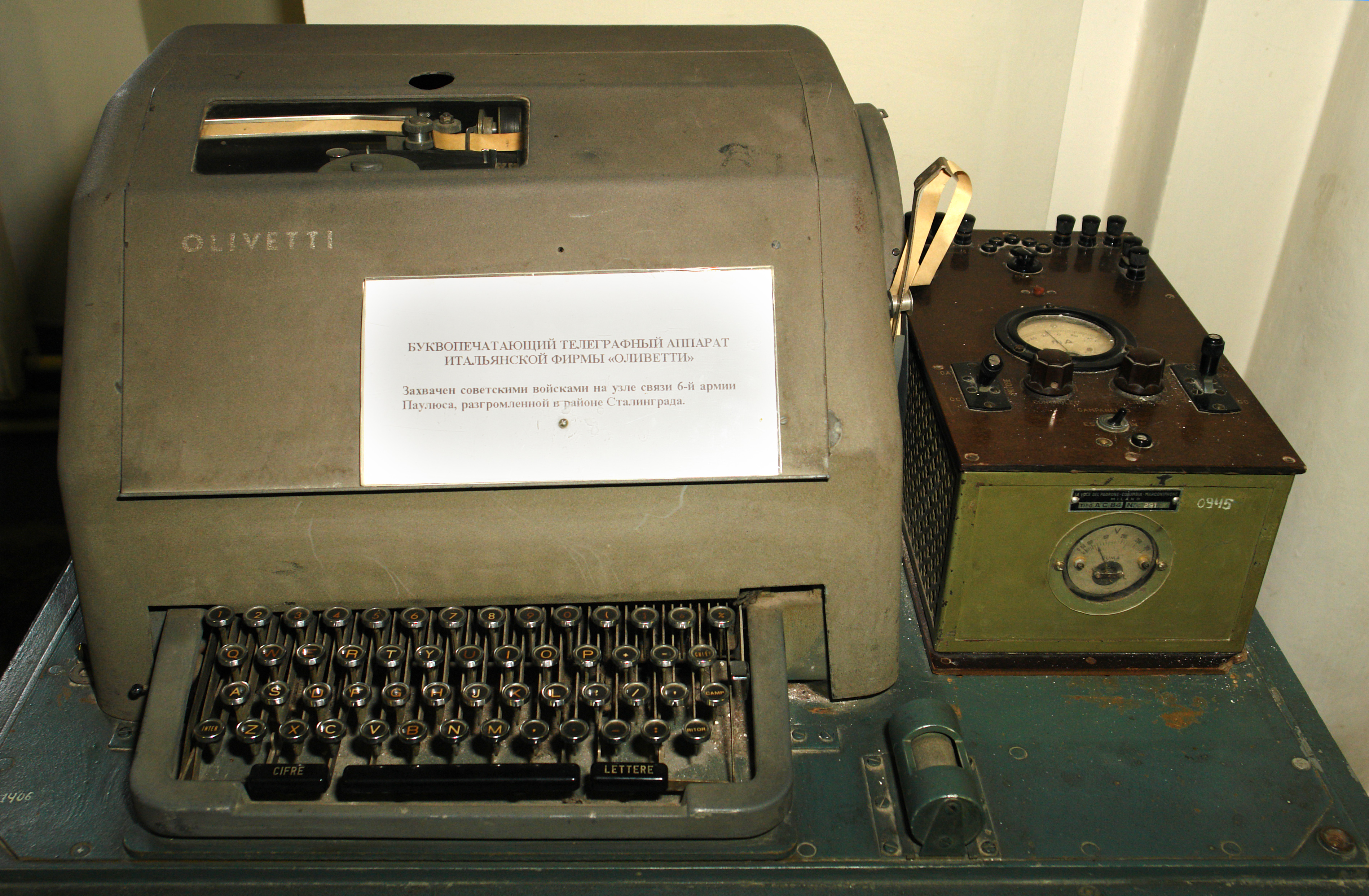 БУКВОПЕЧАТАЮЩИЙ ТЕЛЕГРАФНЫЙ АППАРАТ ИТАЛЬЯНСКОЙ ФИРМЫ «ОЛИВЕТТИ» Захвачен советскими войсками на узле связи 6-й армии Паулюса, разгромленной в районе Сталинграда.